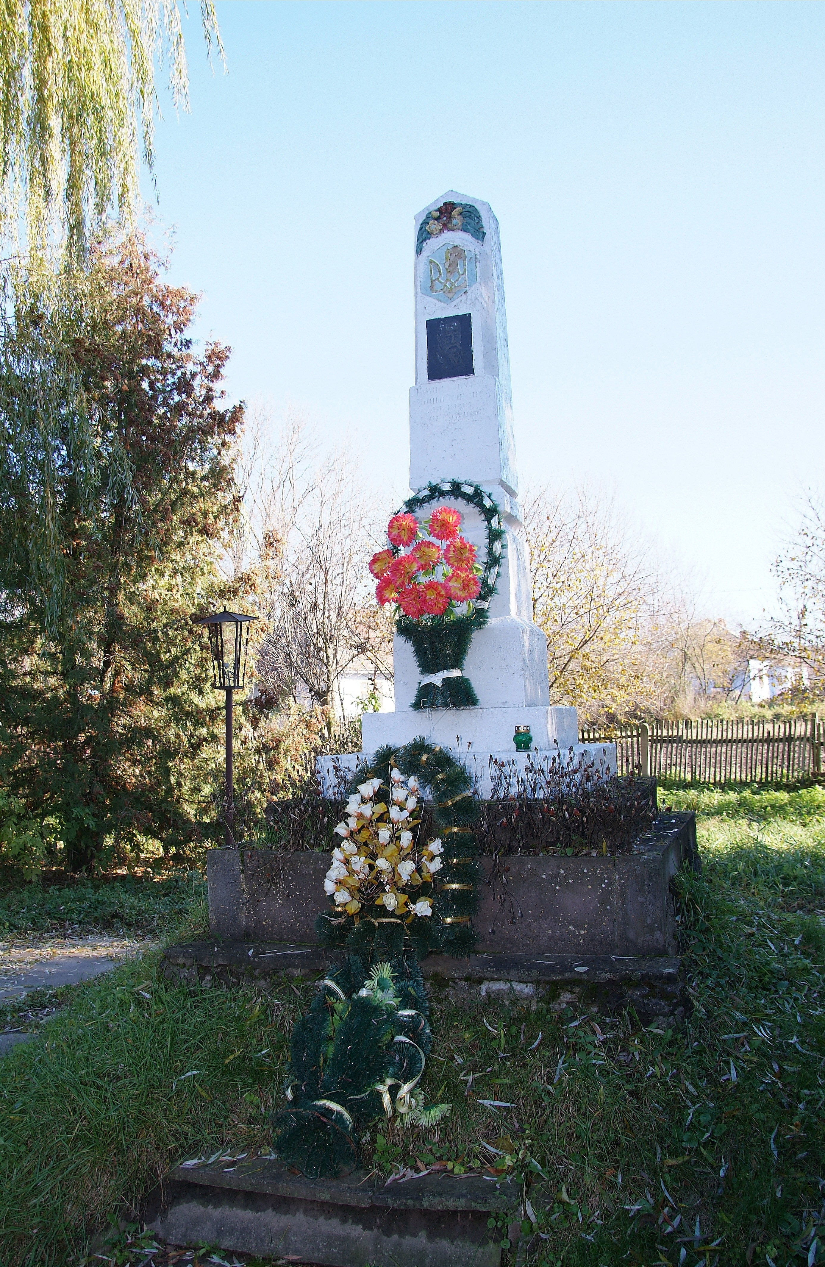 Пам'ятник поету, письменнику, художнику Шевченку Тарасу Григоровичу, село Залав'є, центр